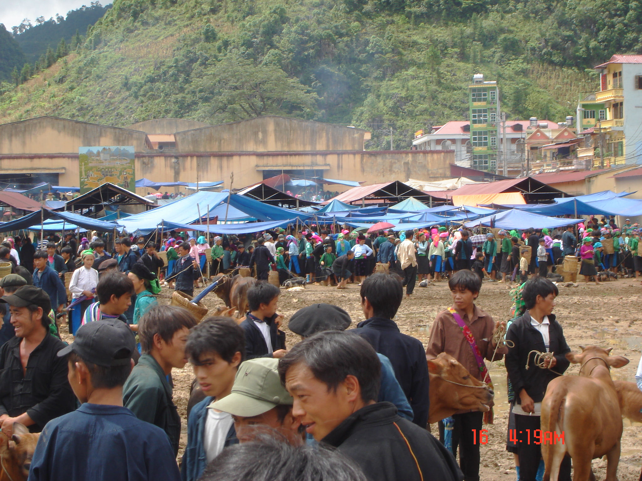 Blick über den Markt von Mèo Vạc